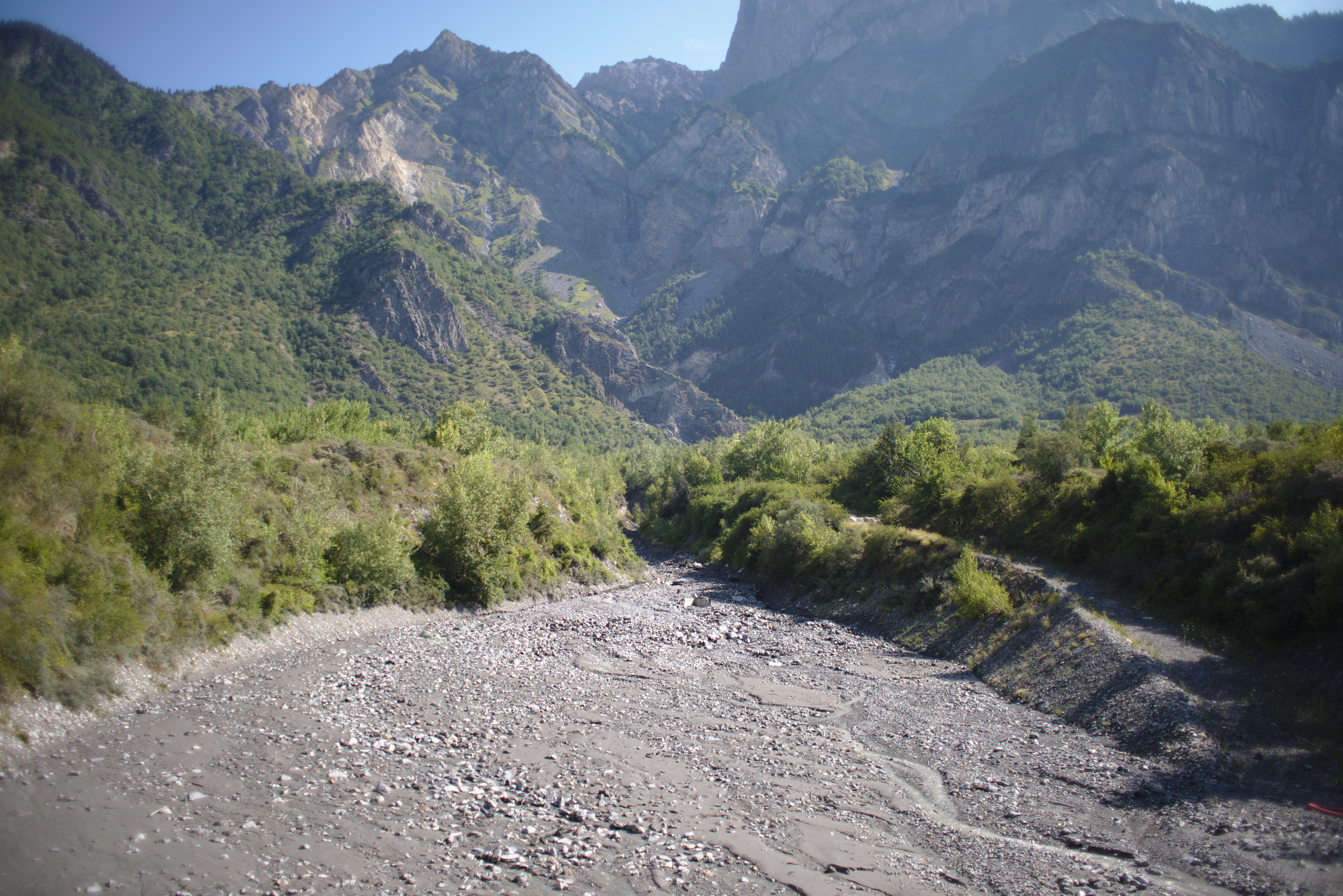 En 2018 cette plage de dépôt va être modifiée, car elle retient trop de matériaux. Ici la plage le lendemain d'une petite lave torrentielle